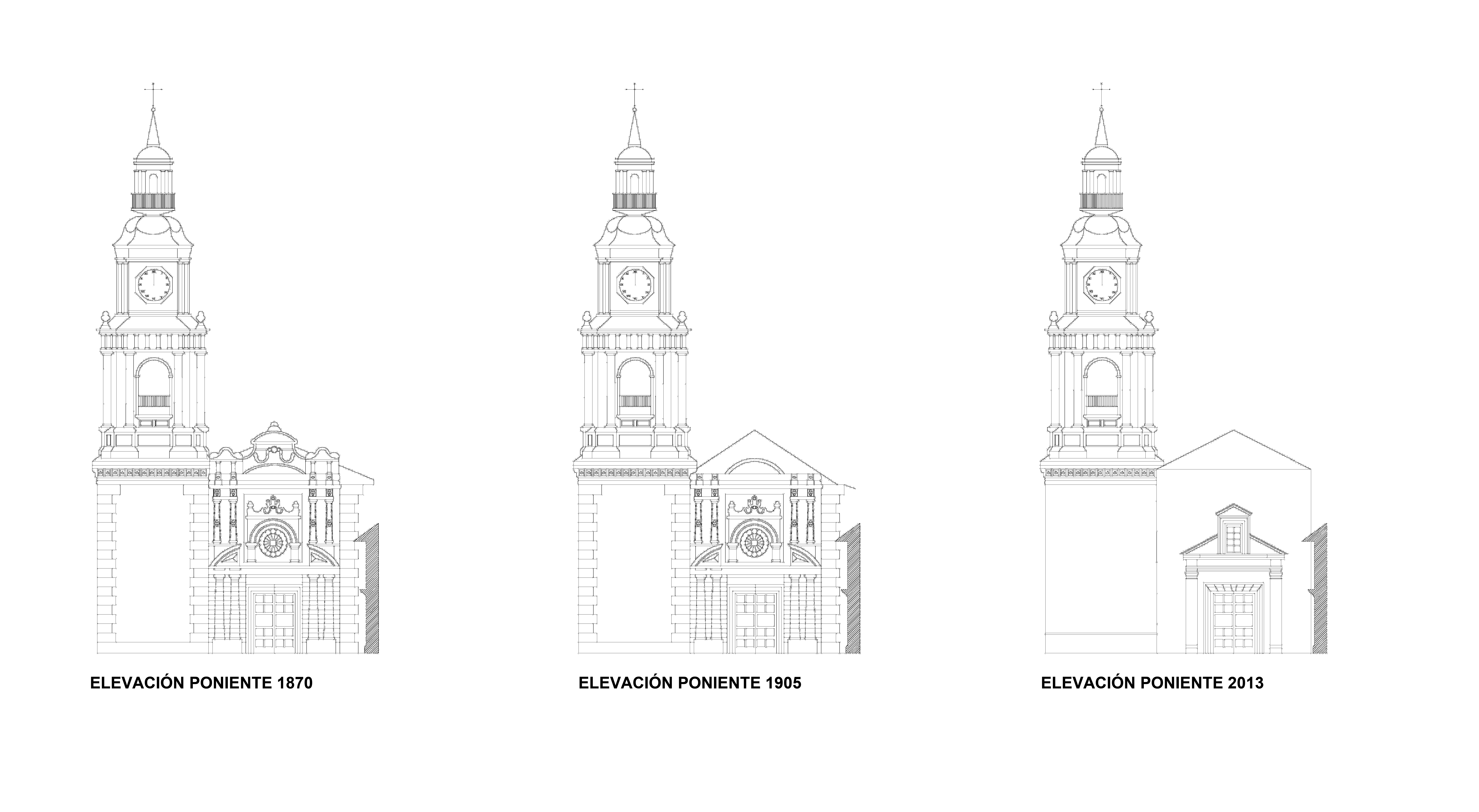 Modificaciones de la fachada poniente Iglesia